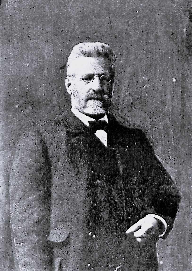 Privatmann August Lüderitz.